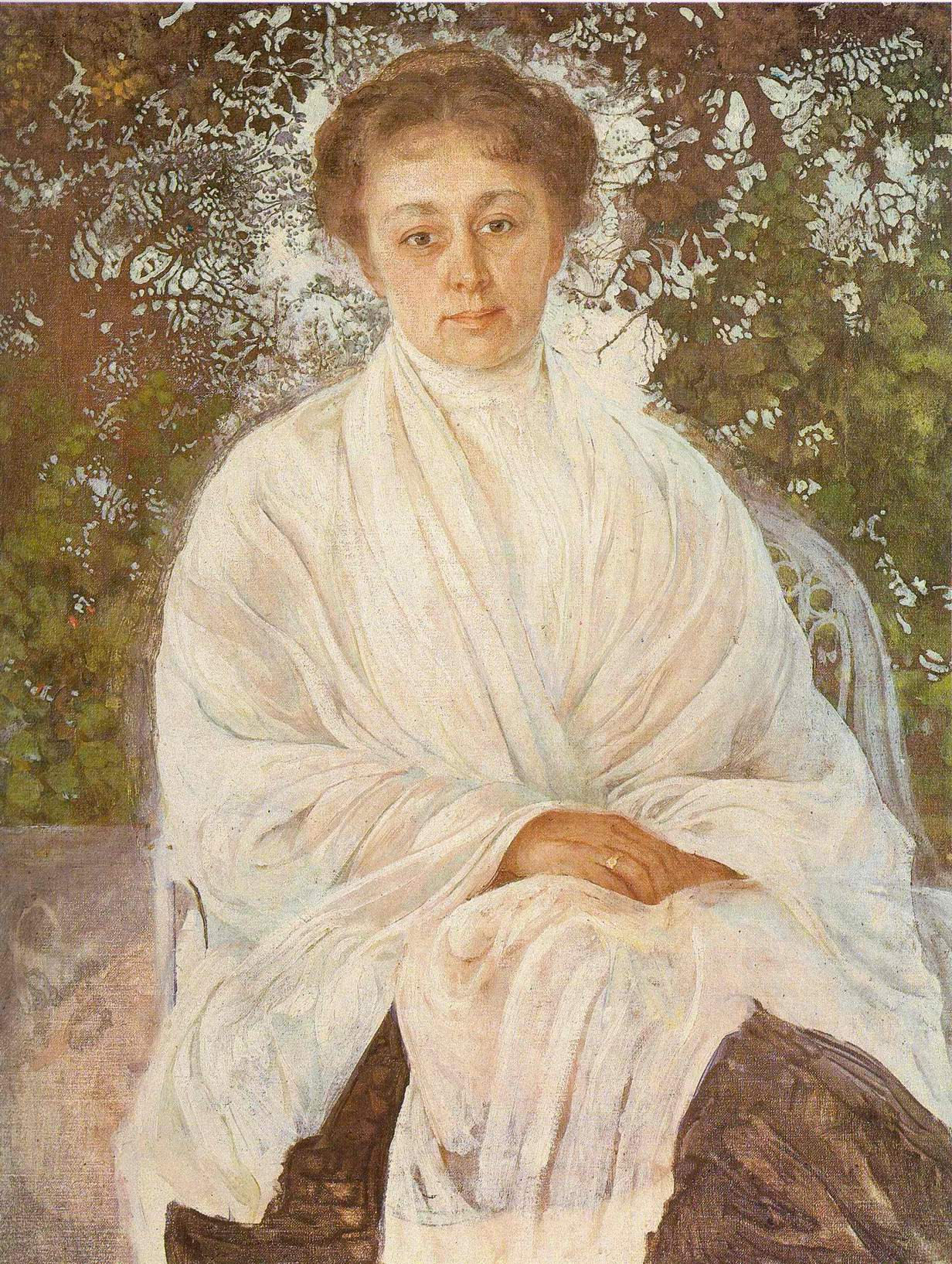 Портрет Марии Федоровны Андреевой